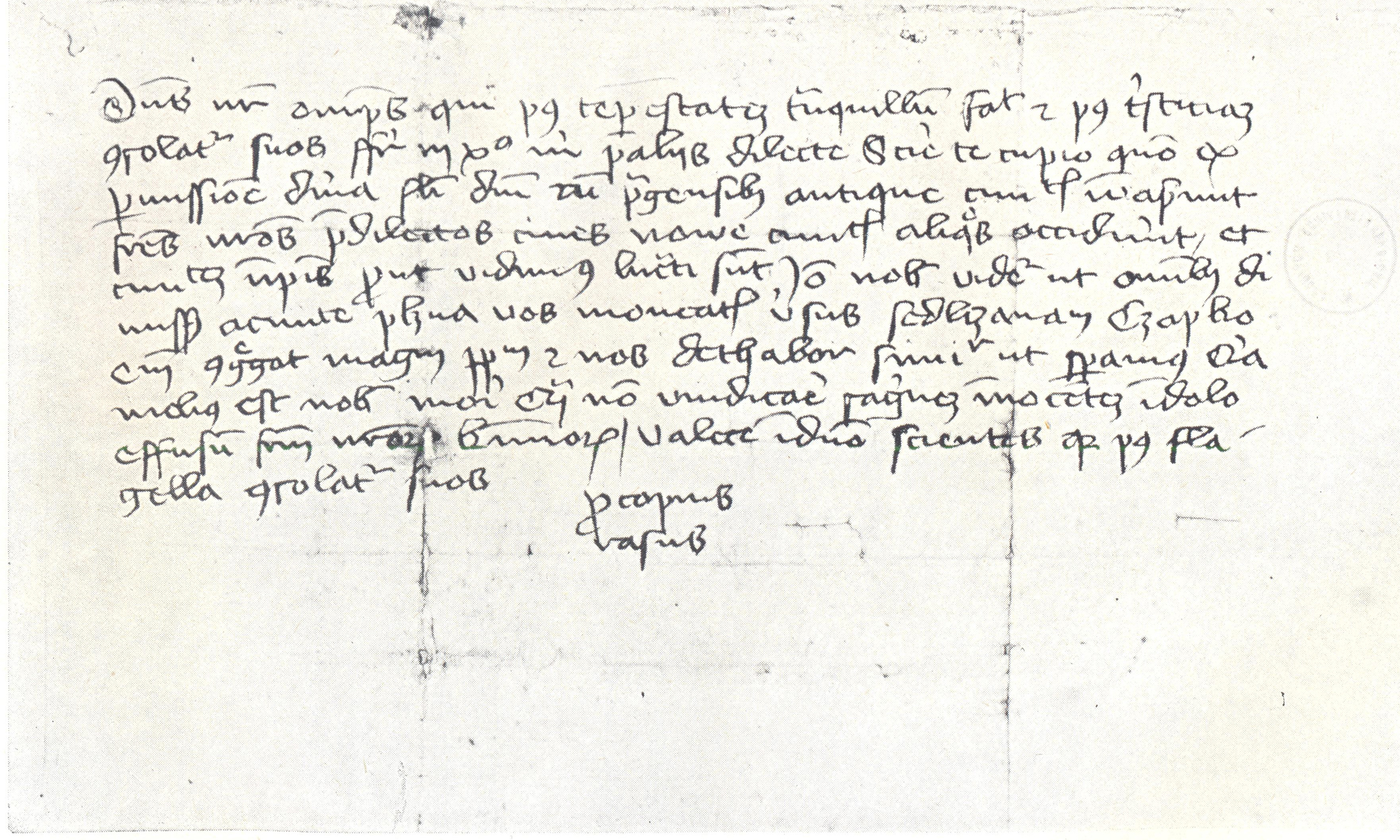 Česky: List Prokopa Holého, adresovaný Prokopovi Malému, kterým informuje vojska obléhající Plzeň o dobytí Nového Města pražského.